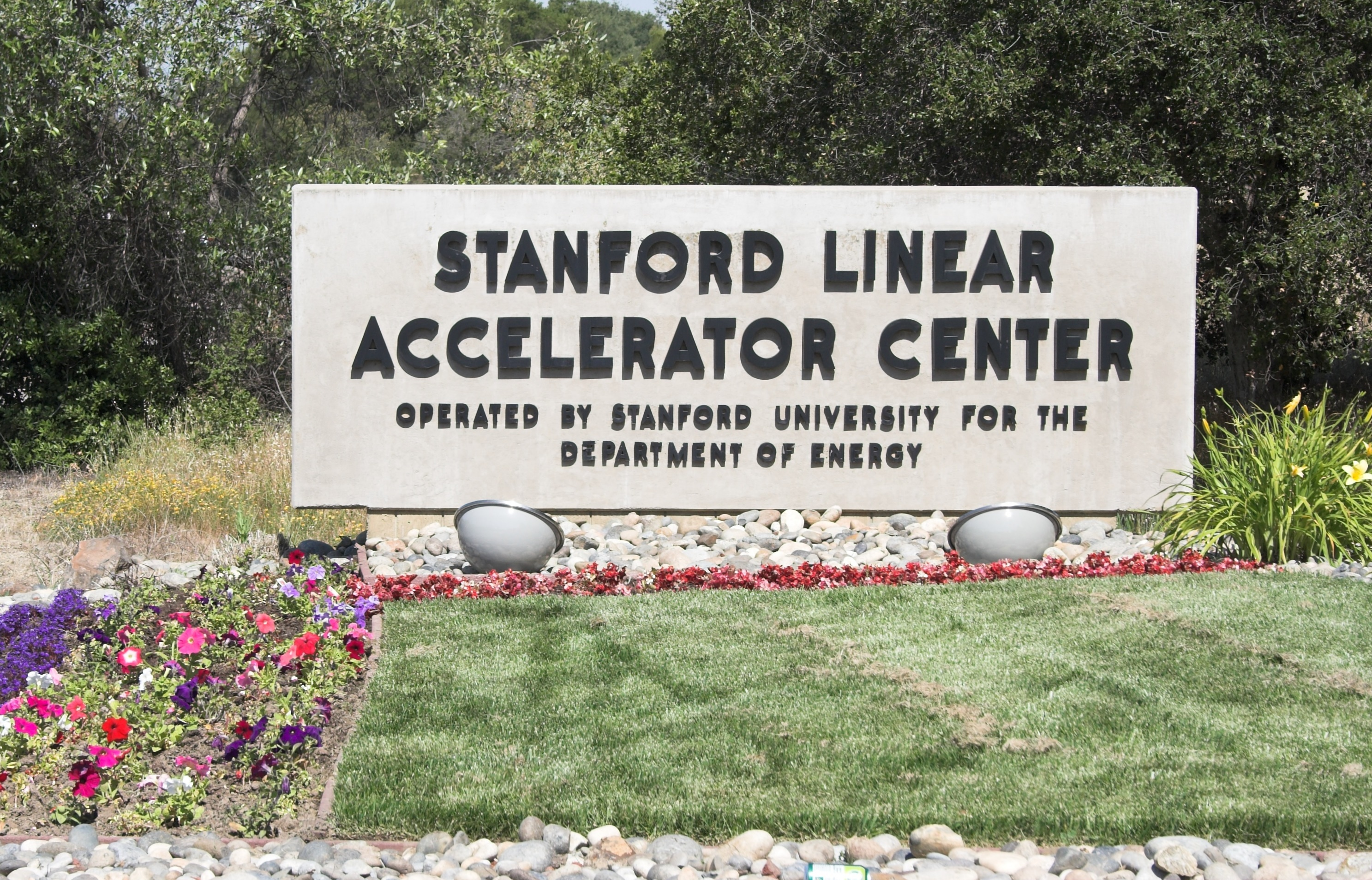 SLAC's entrance sign.